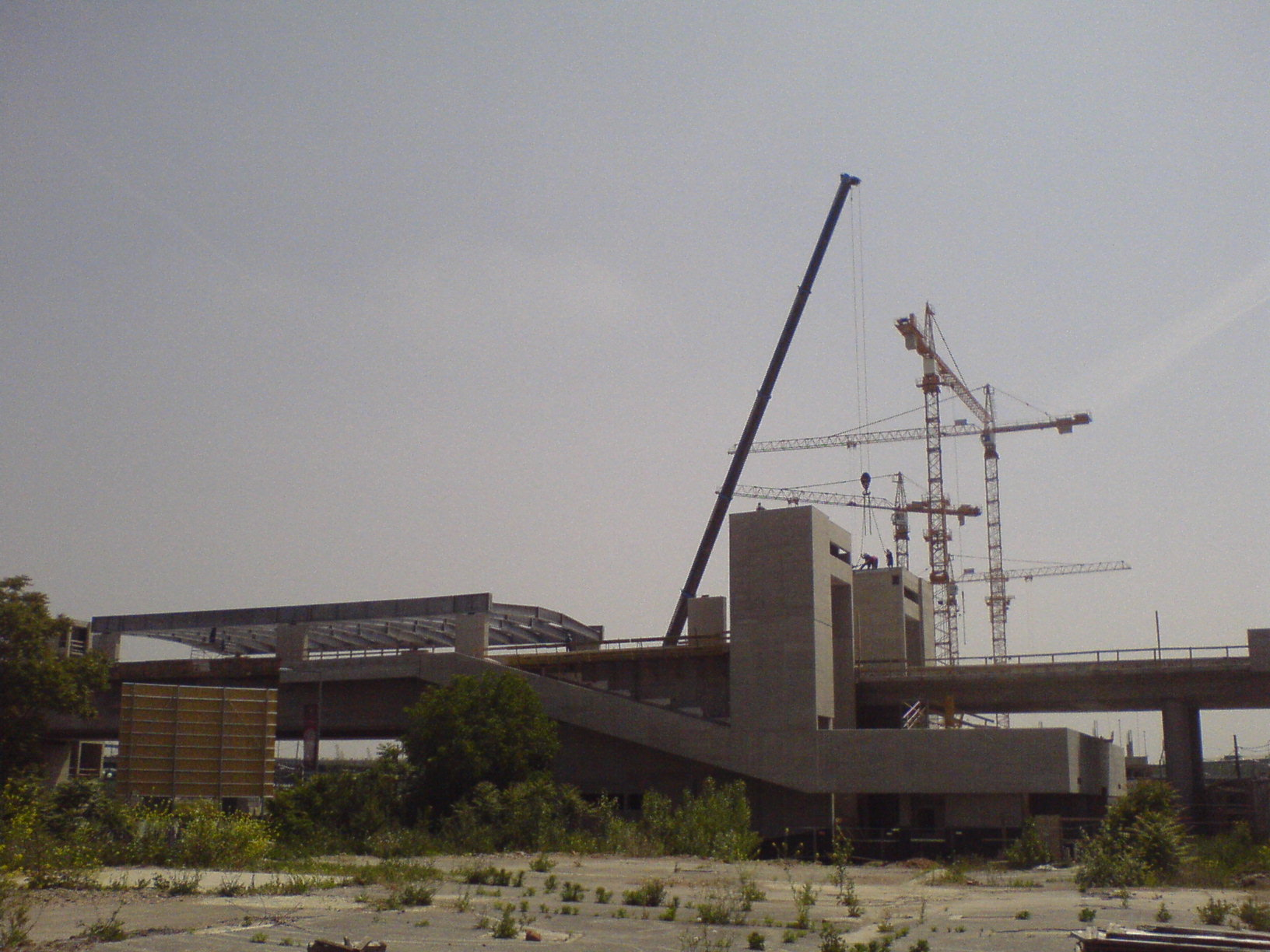 Baustelle der Station Donaumarina